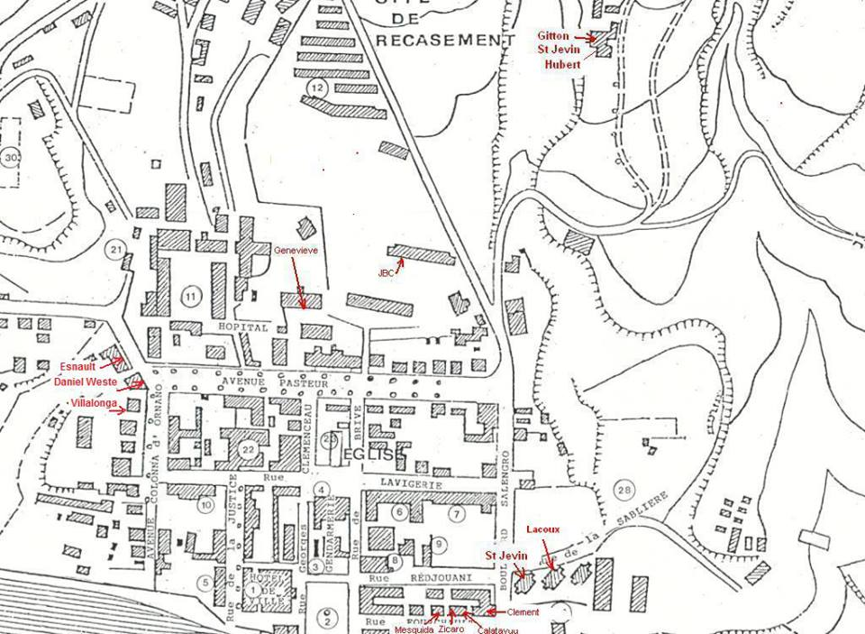 Plan de la Cité Justice à Thénia